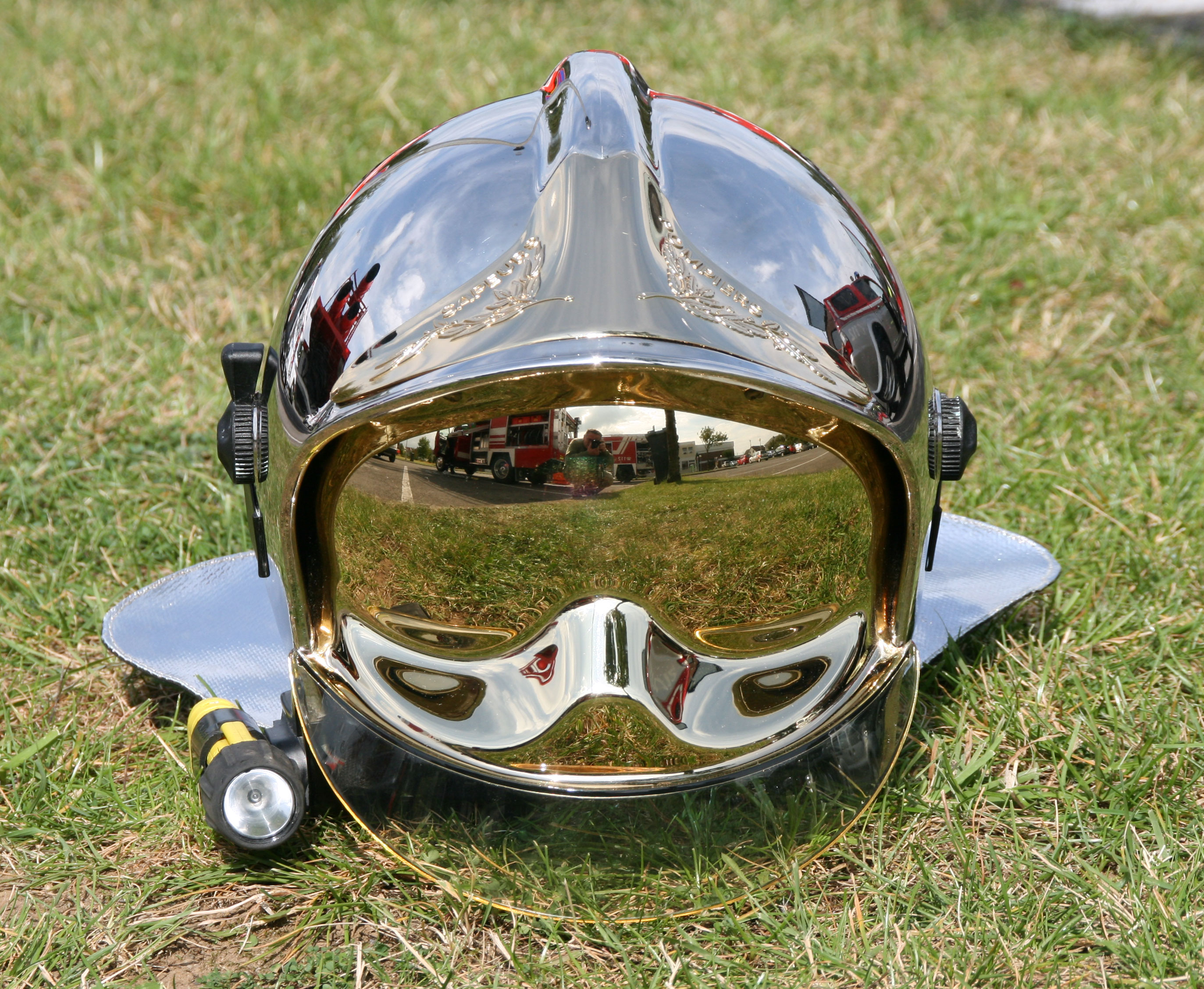 Den F1 Helm